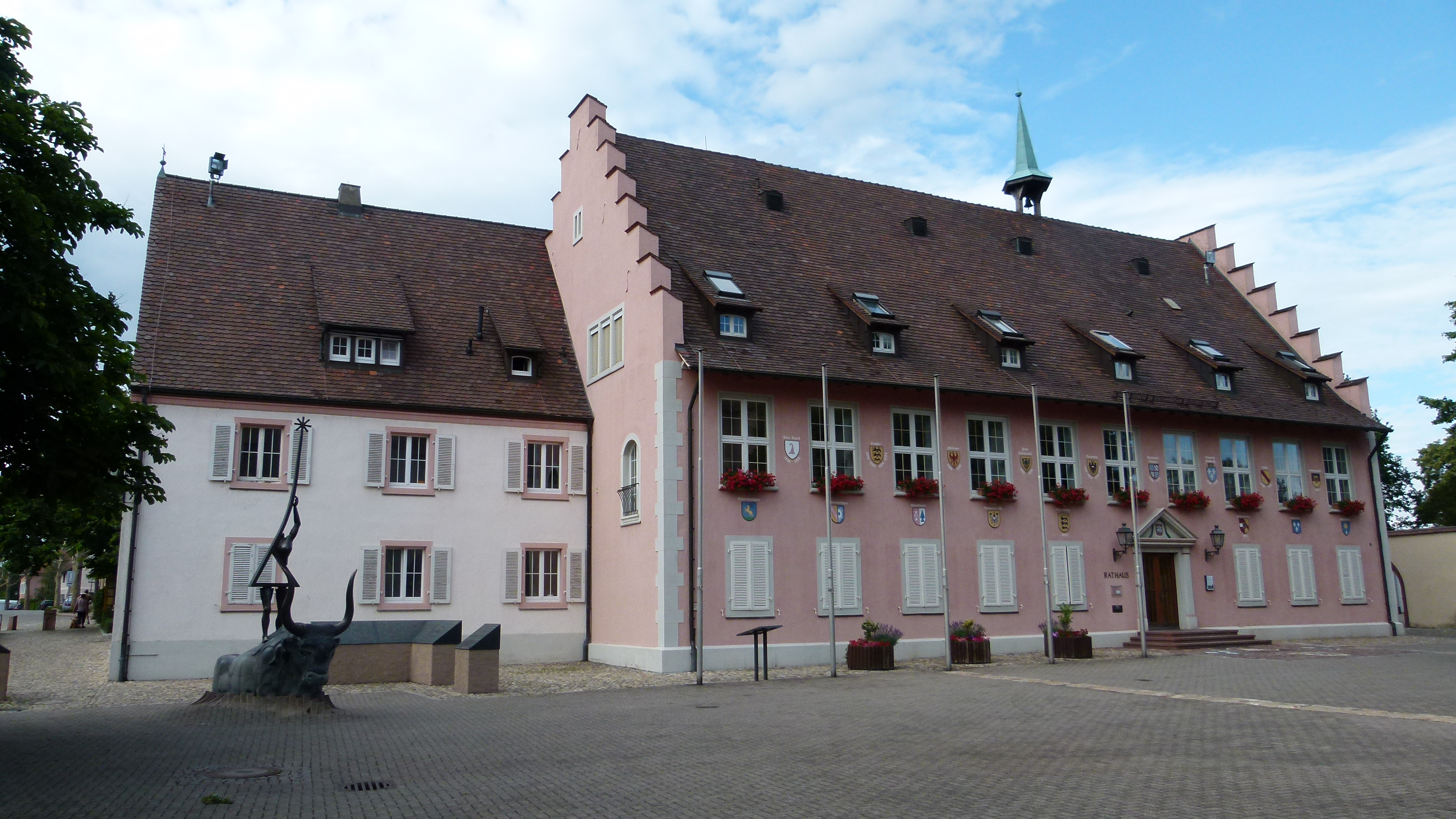 Rathaus von Breisach am Rhein